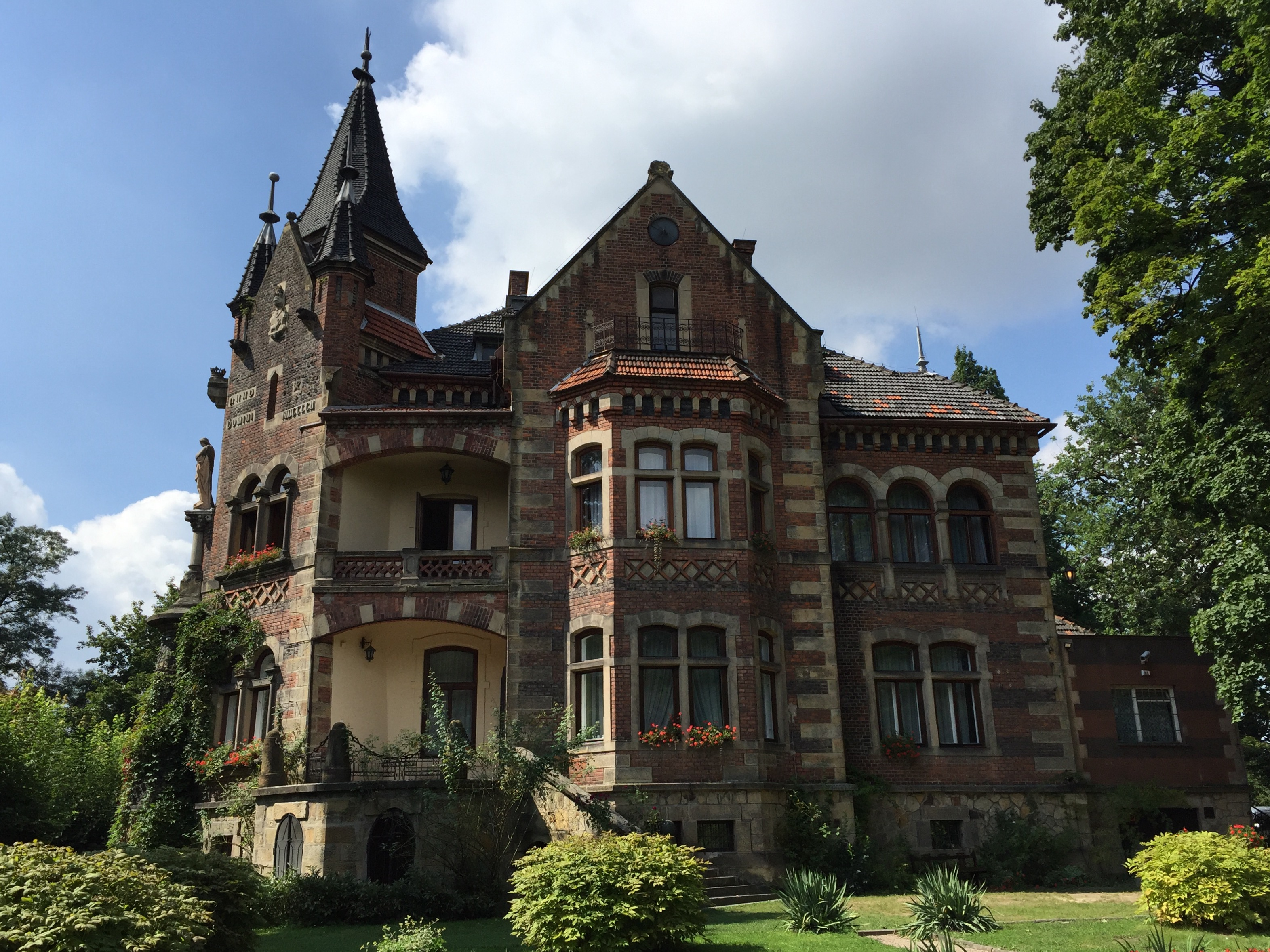 Grodkowice, Pałac Żeleńskich, 1906